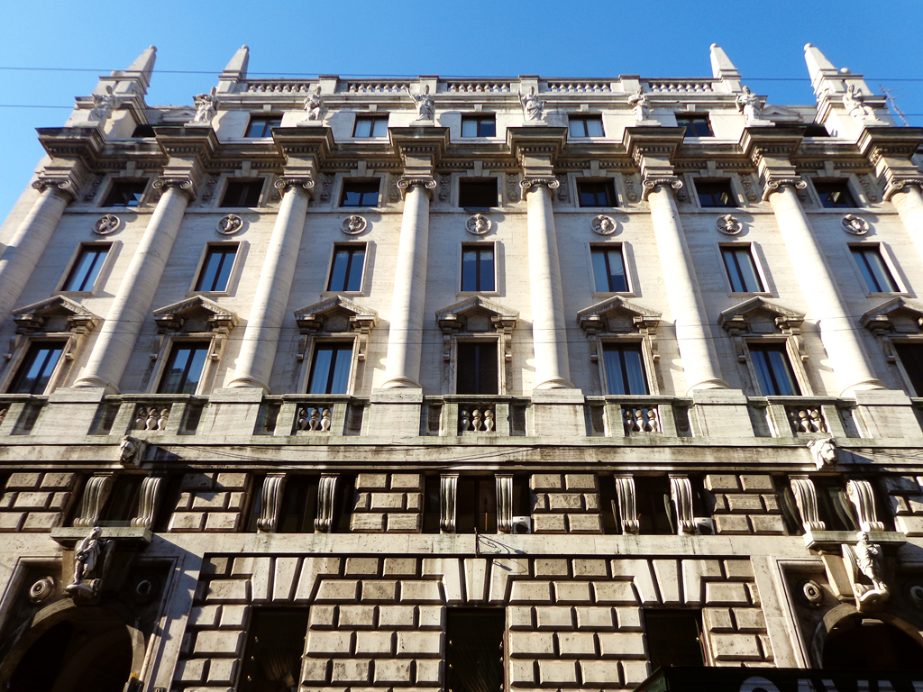 Milano, palazzo Cusini, la facciata.